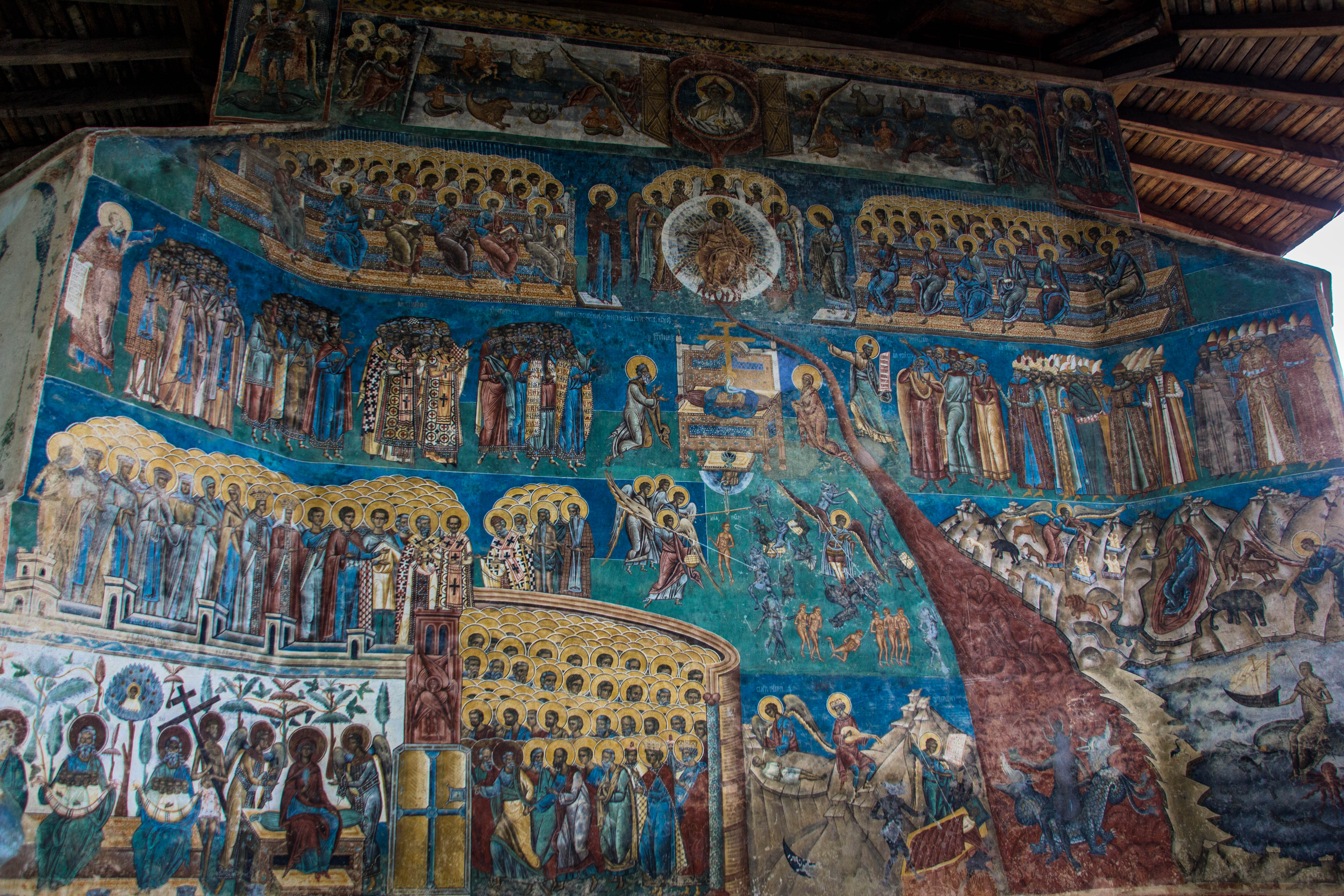 Mănăstirea Voroneț